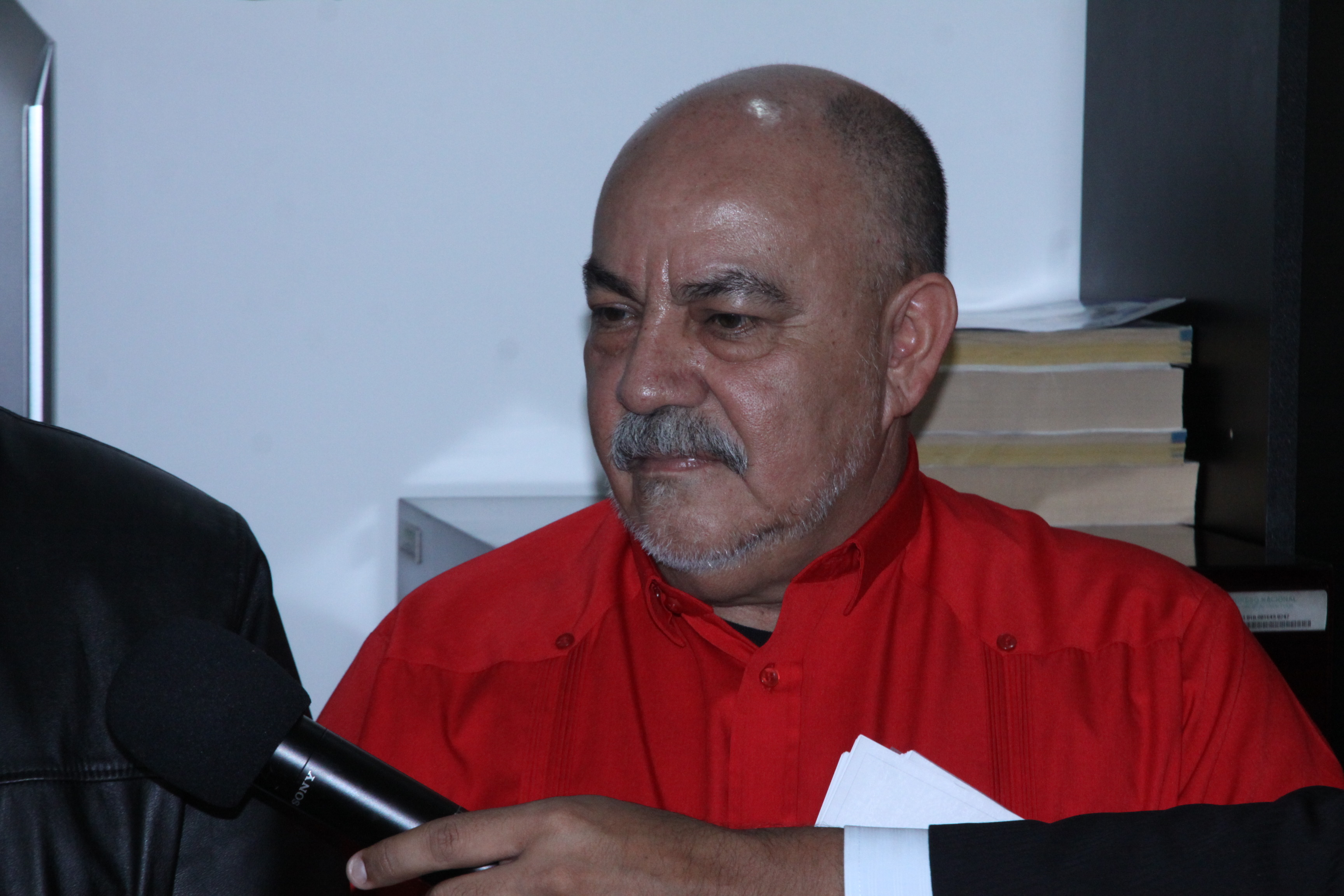 Foto: Hugo Ortiz Ron / Asamblea Nacional